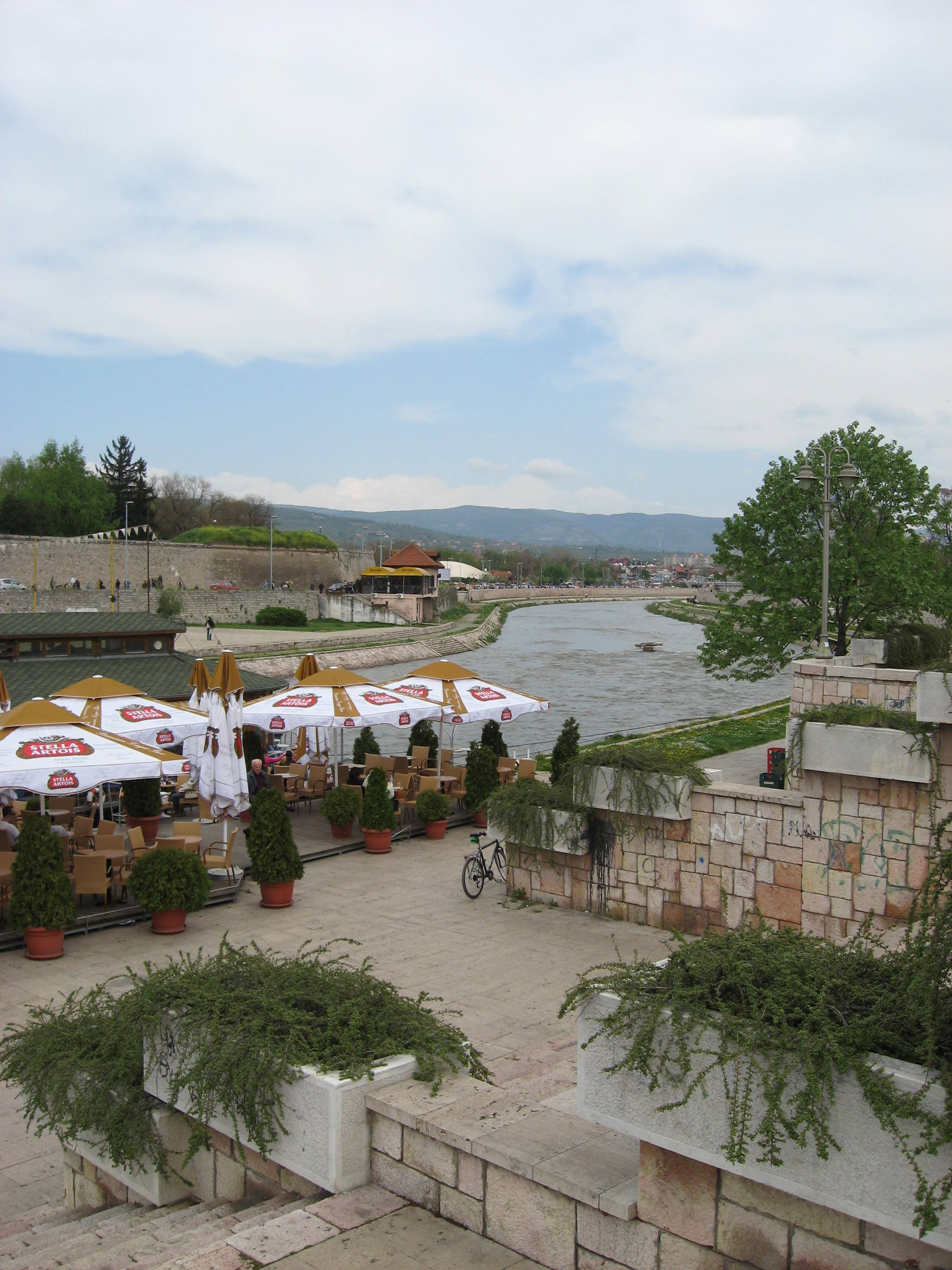 Nišava river in Niš